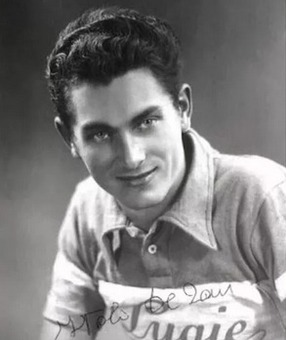 Italo de Zan nel 1946